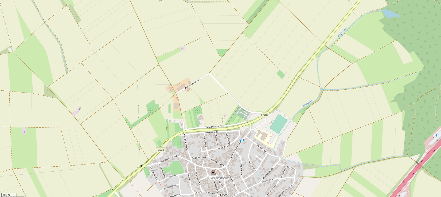 Lage Altertheimer Weg (Großrinderfeld) bei Großrinderfeld-Gerchsheim